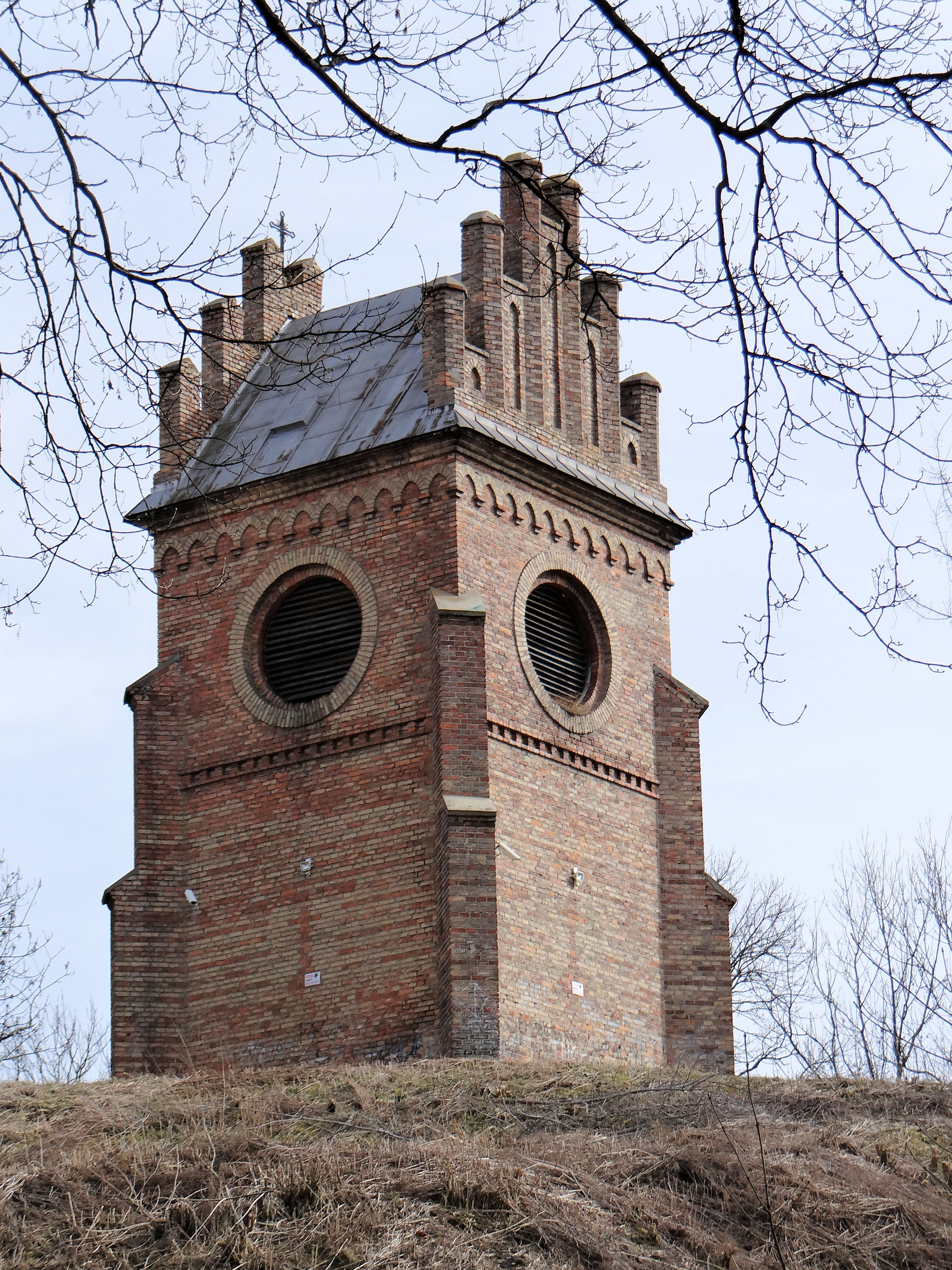 Ciechanów, dzwonnica, 1889